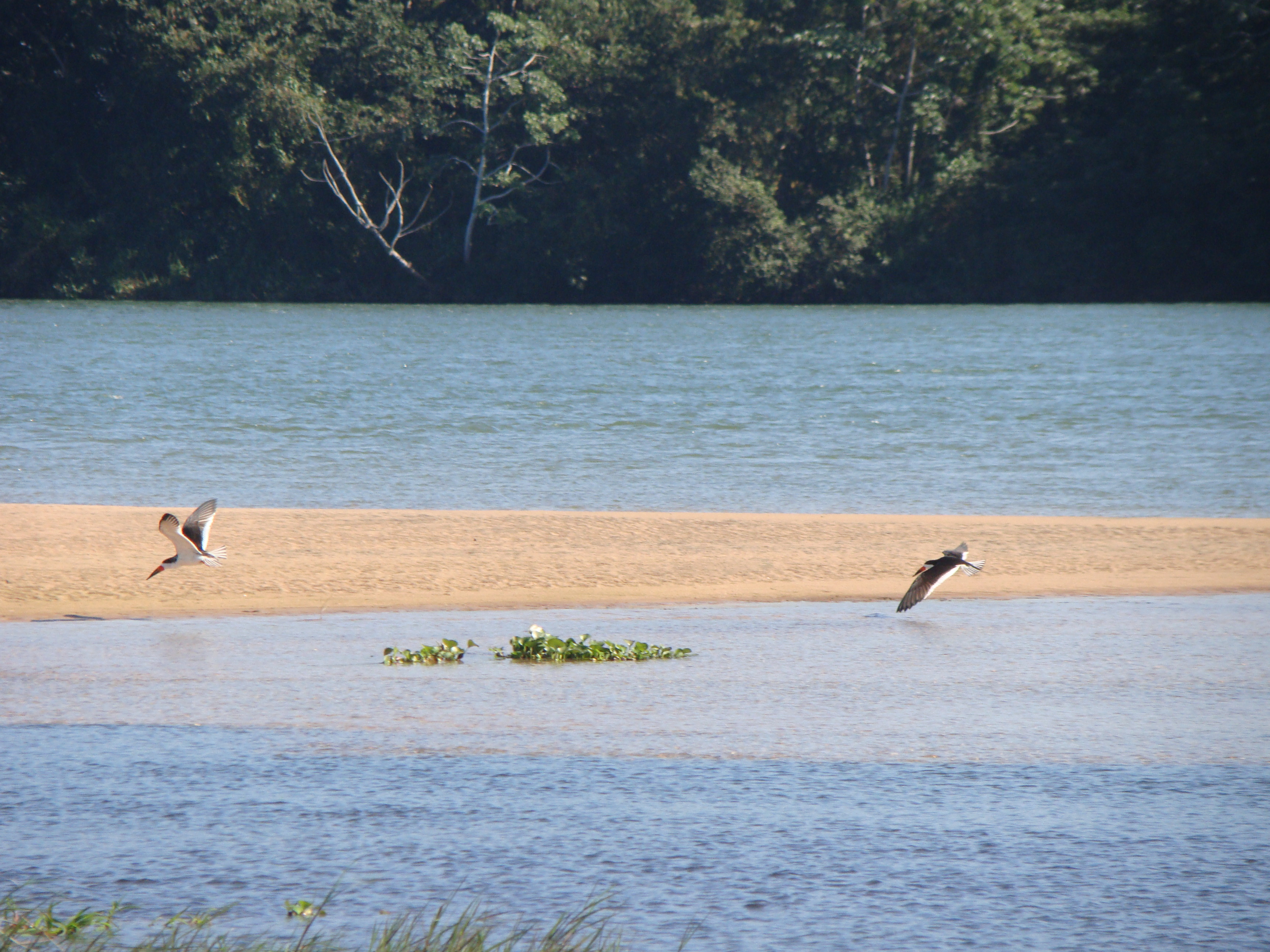 Praia no Parque Nacional de Ilha Grande